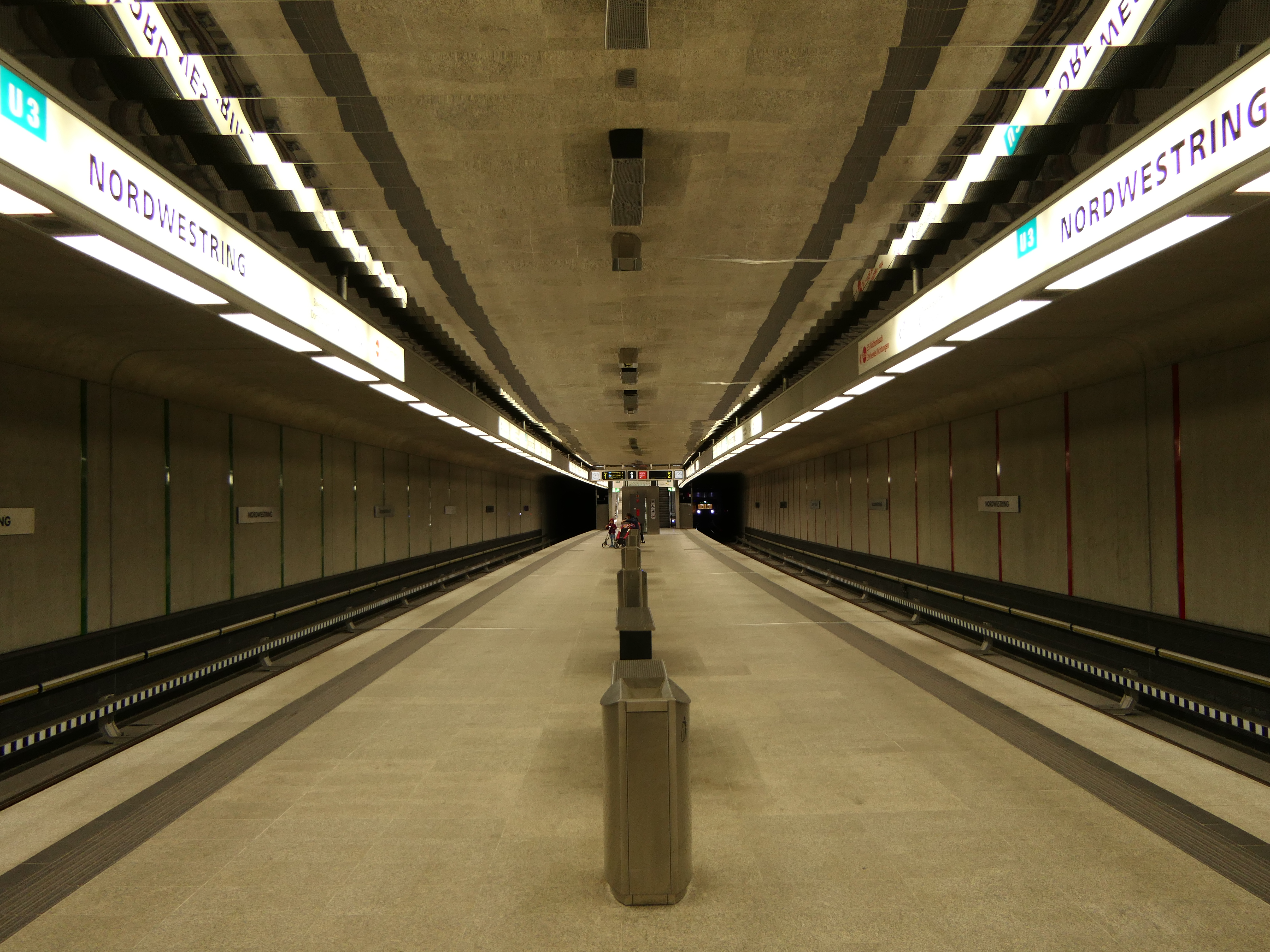 Bahnsteigebene am U-Bahnhof Nordwestring in Nürnberg.